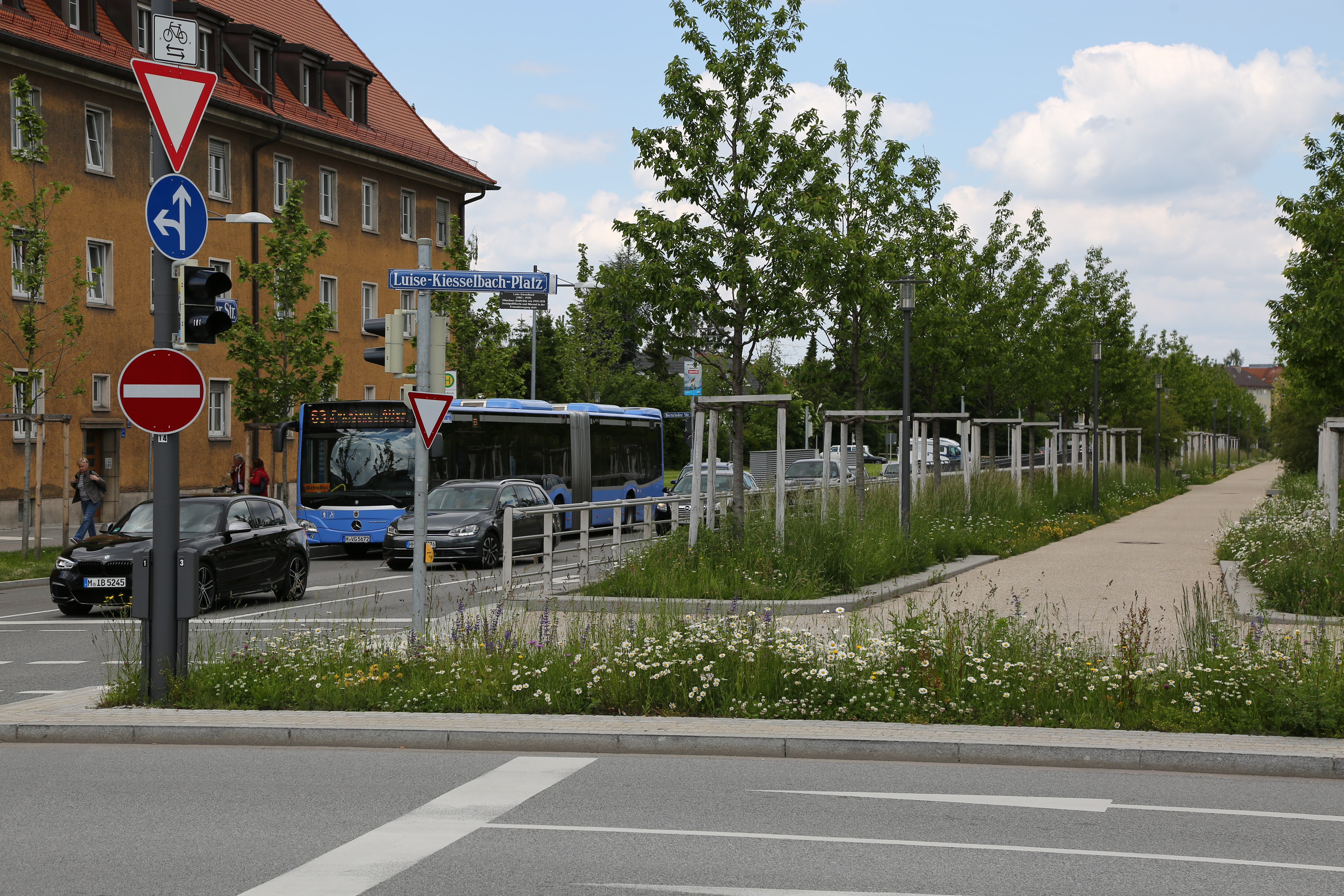 Anfang der Garmischer Straße am Luise-Kiesselbach-Platz in München. Nach dem Bau des Luise-Kiesselbach-Tunnels findet an der Oberfläche nur noch Quell- und Zielverkehr statt. Die breite Mittelpromenade konnte gebaut werden, weil es statt vorher drei Spuren jetzt nur noch eine Fahrspur pro Richtung gibt.